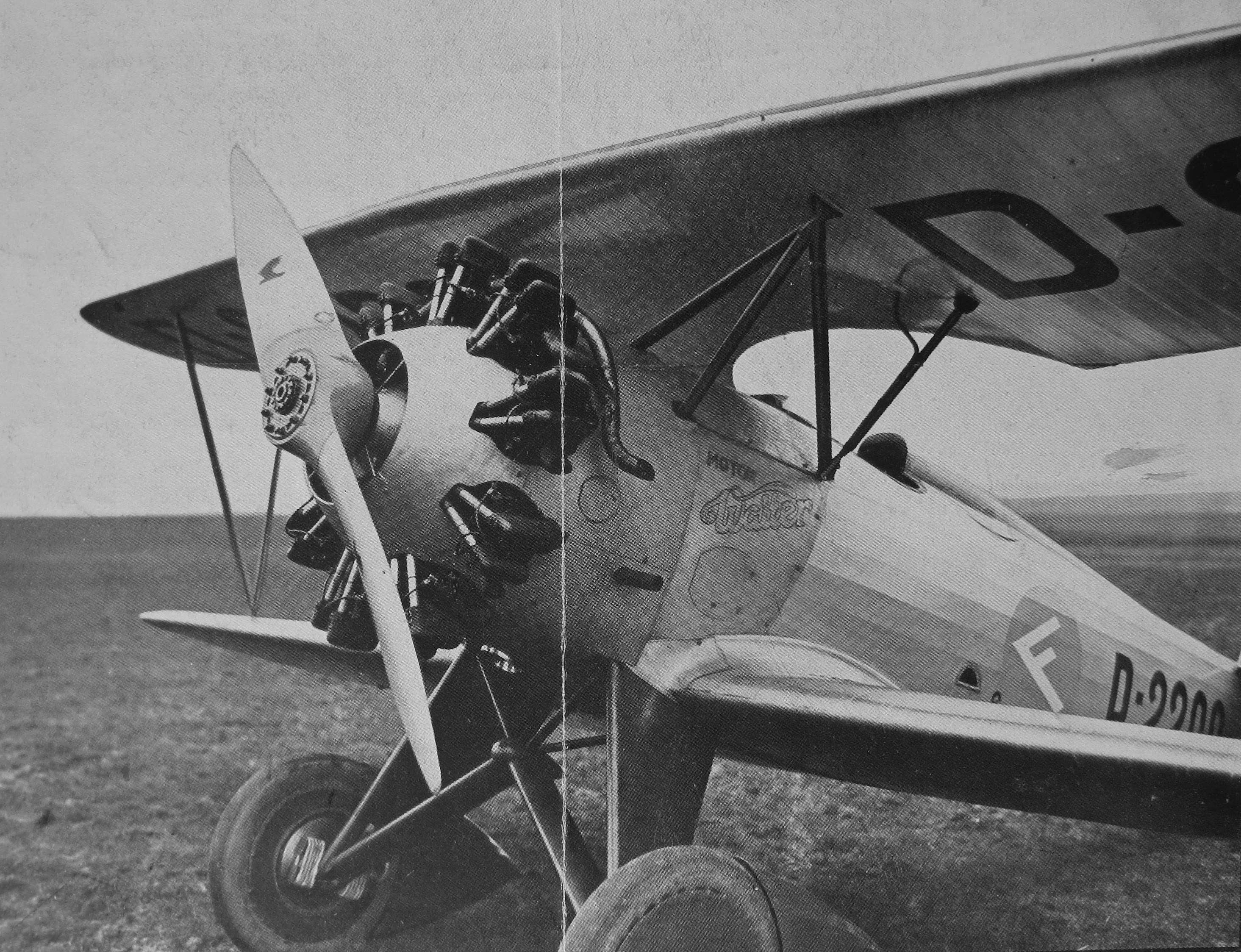 Letecký motor Walter Pollux II A a akrobatický letoun Fieseler F2 Tiger (1934)